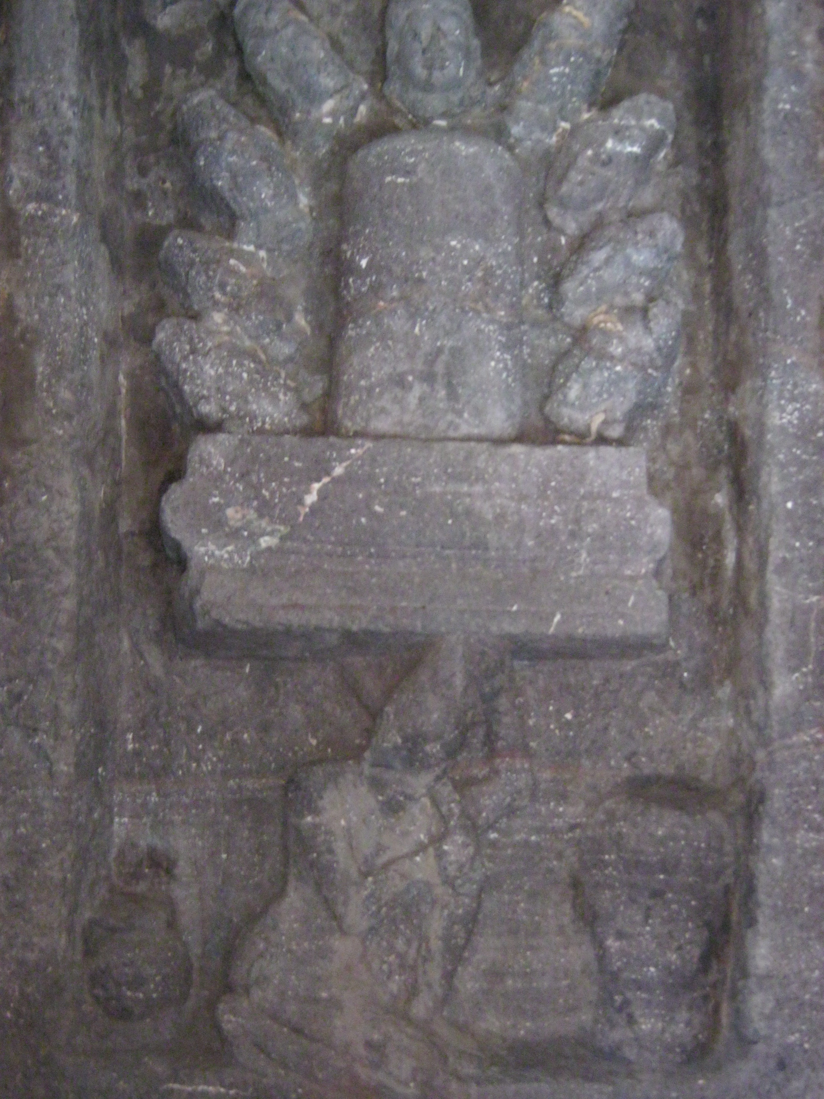 நவகிரகங்கள் சிவனை லிங்க உருவிலு வழிபடும் சிற்பம்.